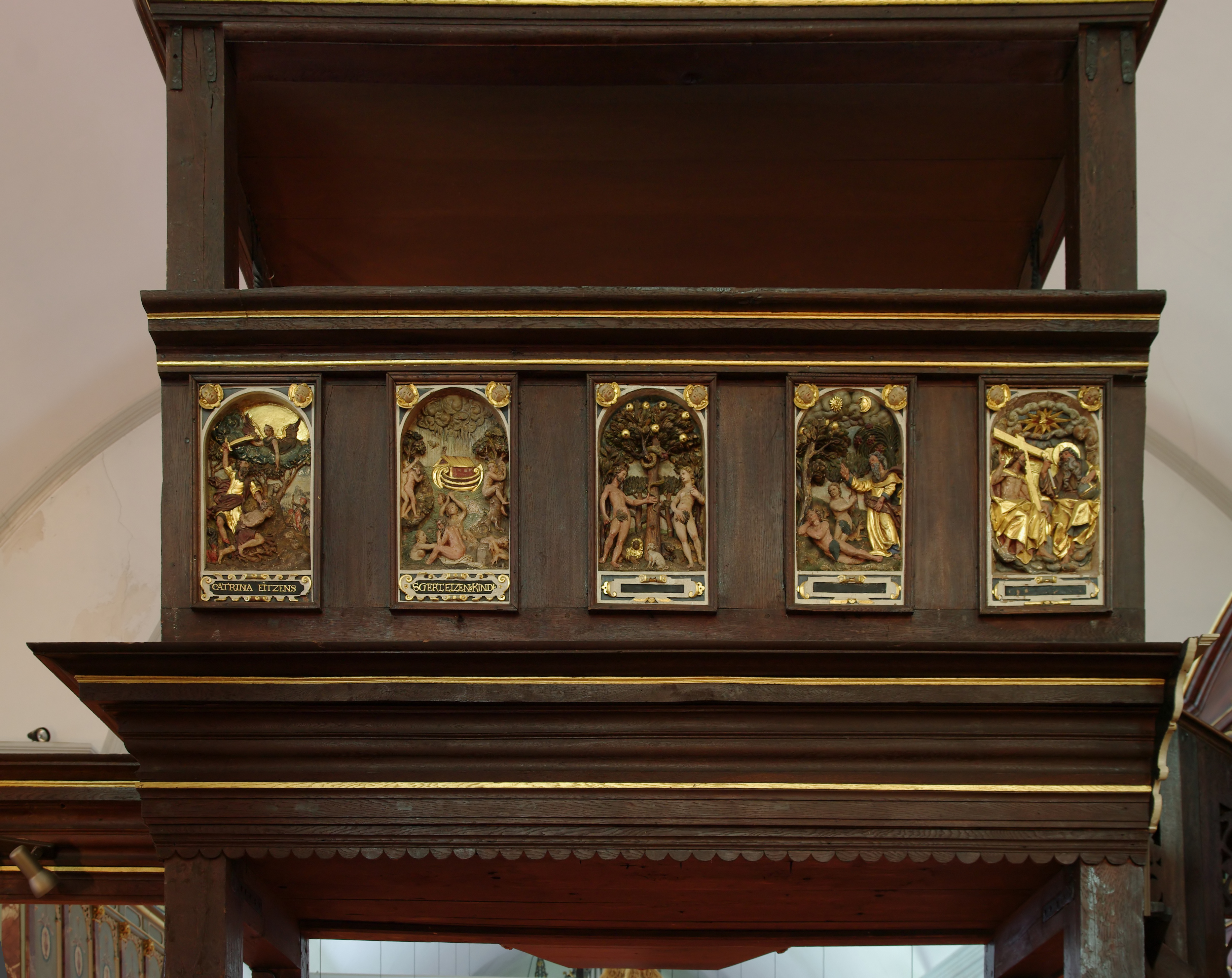 DiE Empore über der Chorabgranzung